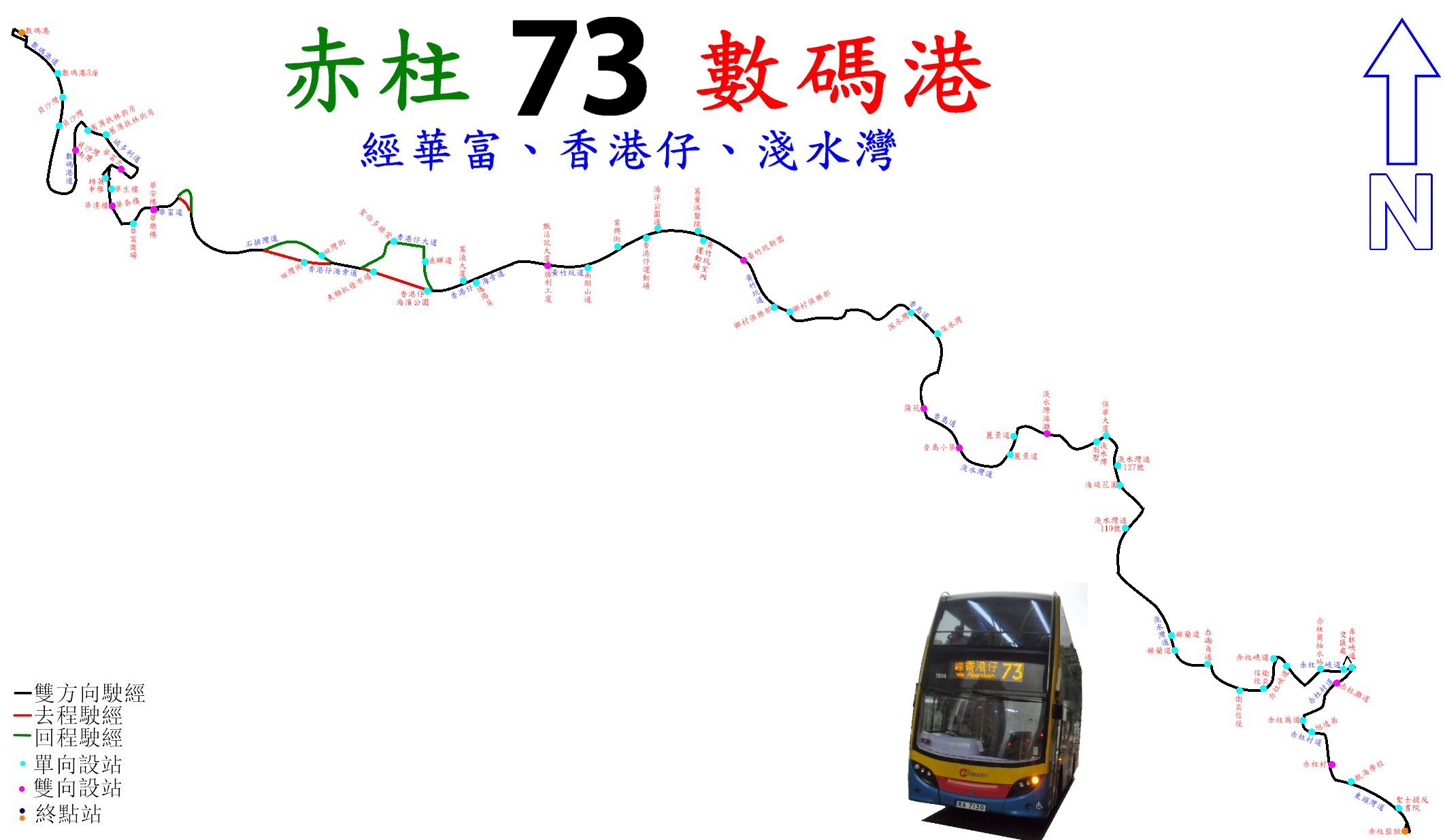 中文（香港）: 城巴73線的走線圖